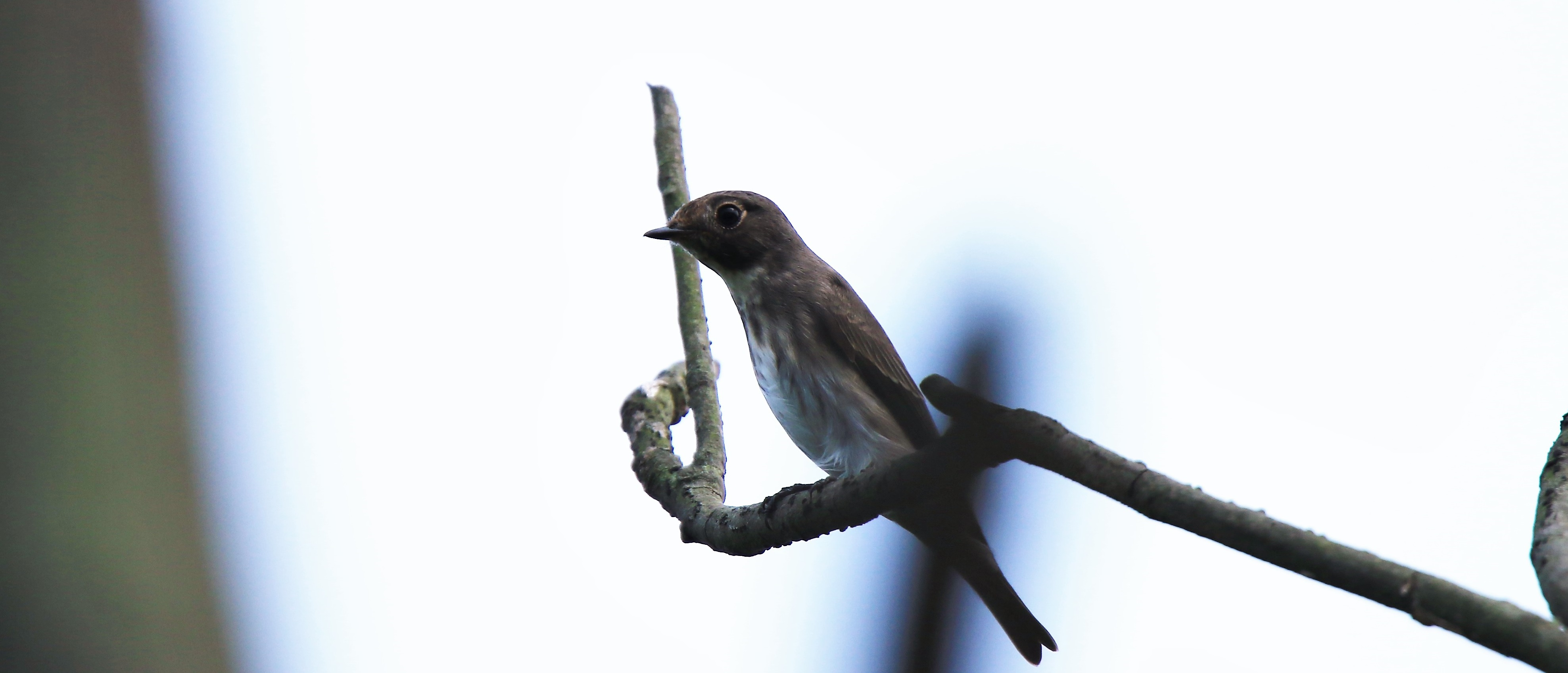 Dark-sided flycatcher